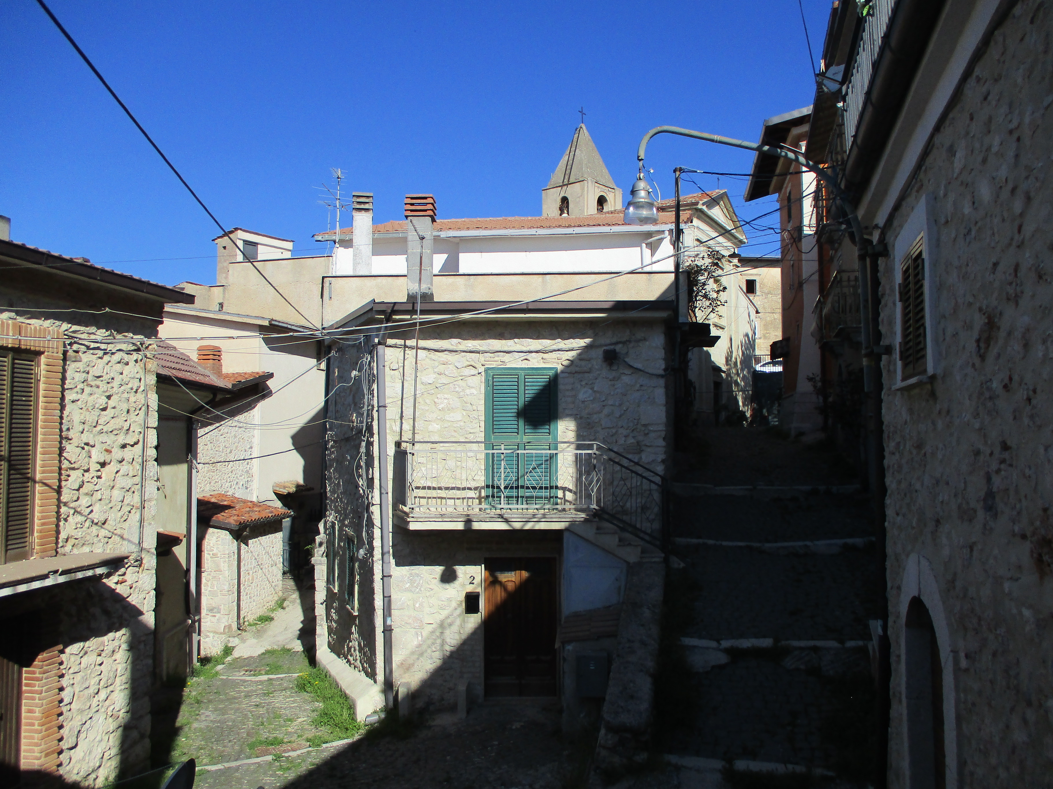 Scorcio del borgo